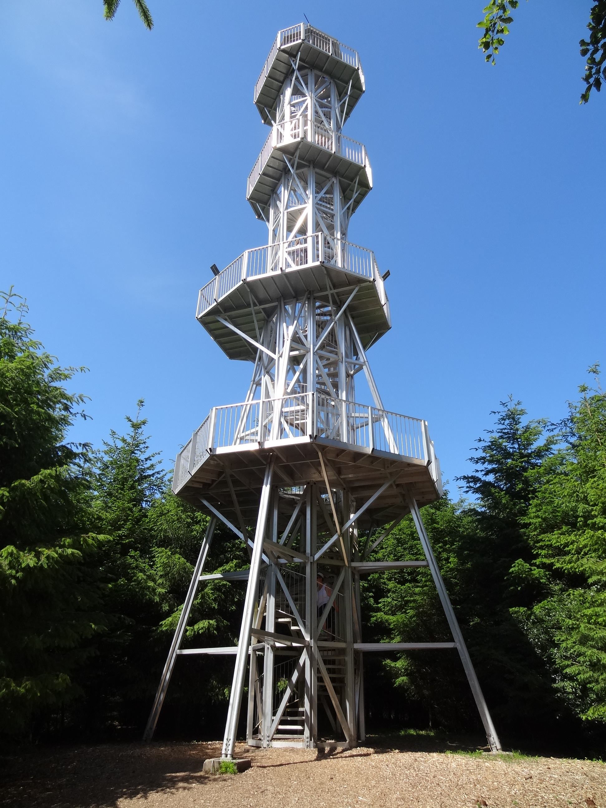 Grünes Meer